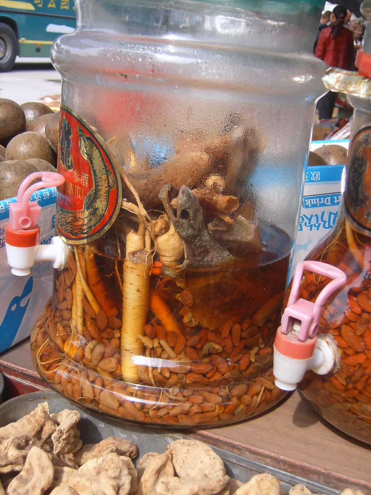 Some elements for Médecine chinoise in Xi'an